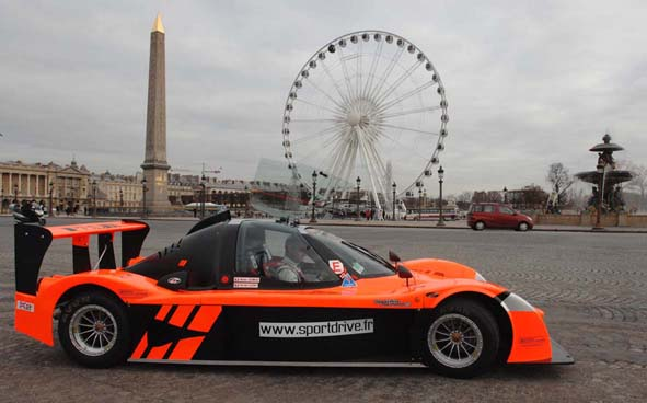 Le sport prototype Tornade de Sport Drive